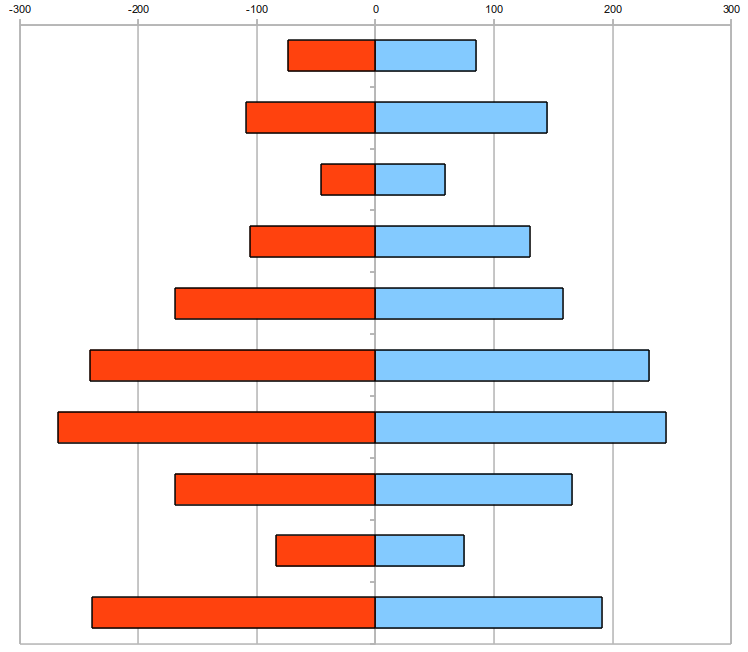 Alterspyramide Hauingen